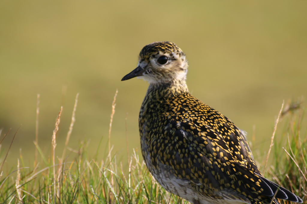 Pluvialis apricaria on Iceland